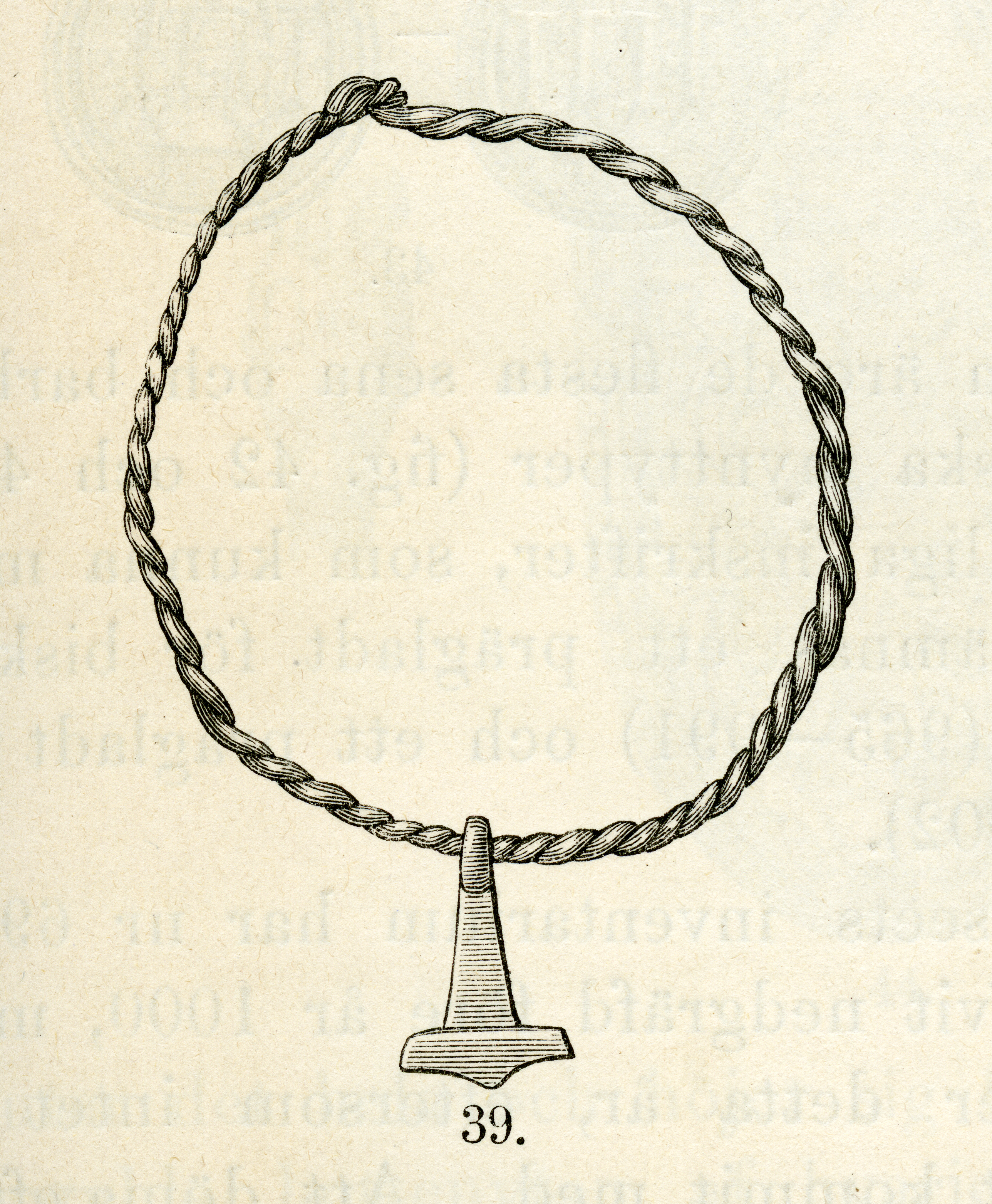 Torshammare i silver från Sandby kyrkogård, Södra Sandby socken, Torna härad, Lunds kommun, Skåne, Sverige. Träsnitt ur Kongl. Vitterhets Historie och Antiqvitets Akademiens Månadsblad (1882) s103. Hans Hildebrand är bladets redaktör.